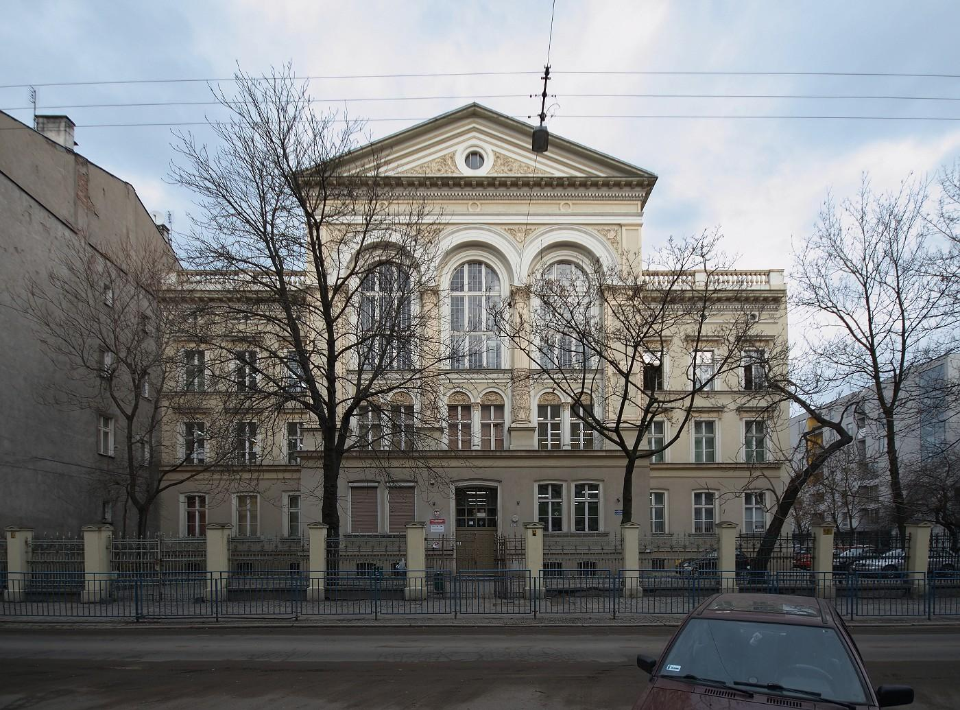 Szkoła Podstawowa nr 2 im. mjr. Henryka Sucharskiego przy ul. Komuny Paryskiej nr 36-38.